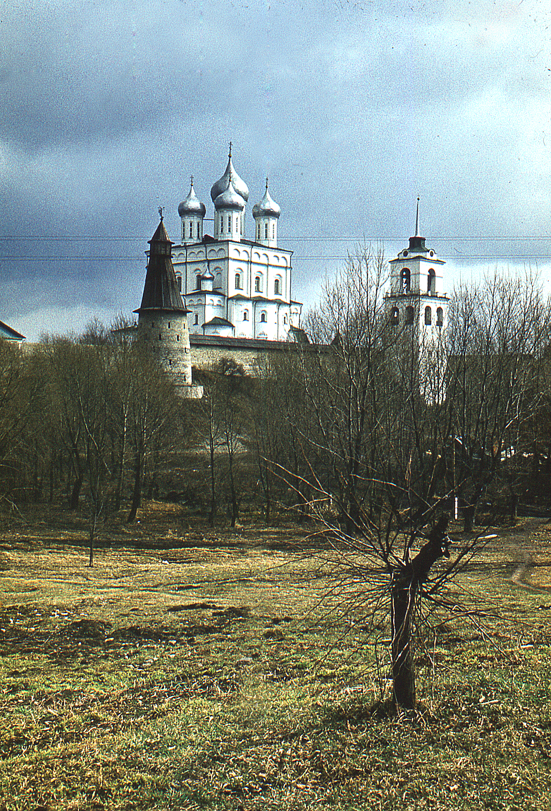 Pskov.Trinity Kafedral.